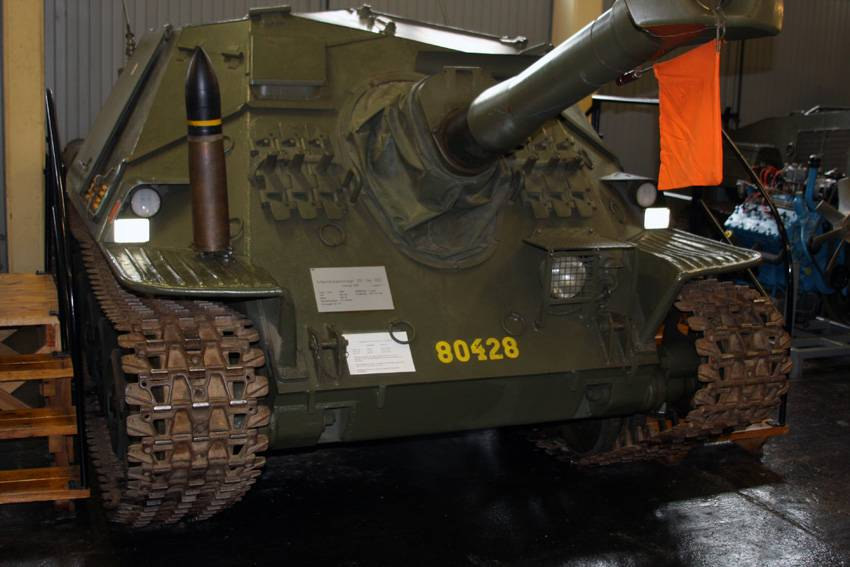 Ikv 103 in museum